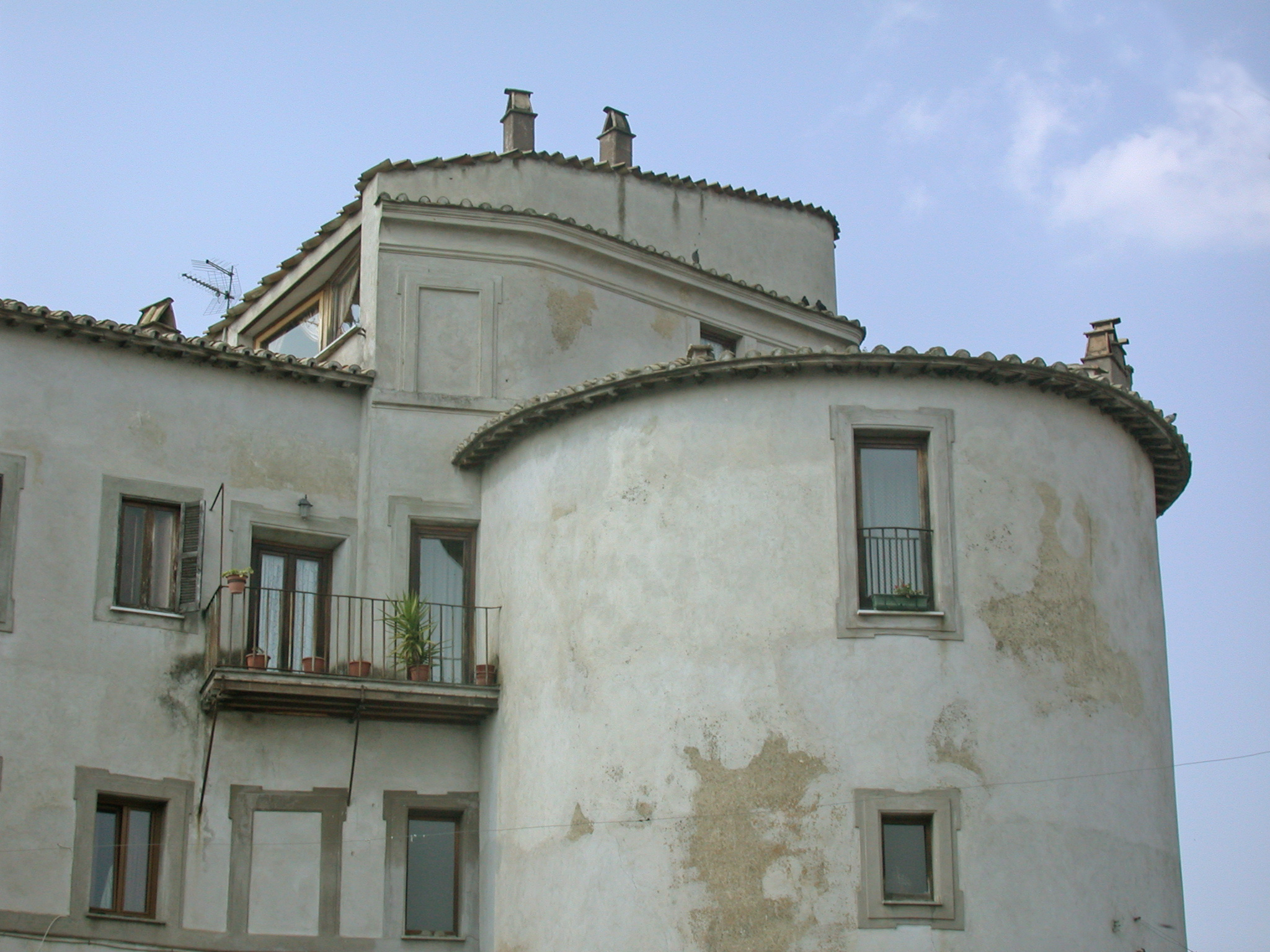 Italia, Regione Lazio, Provincia di Roma, Sacrofano, borgo fortificato, torre rotonda angolare rimaneggiata.